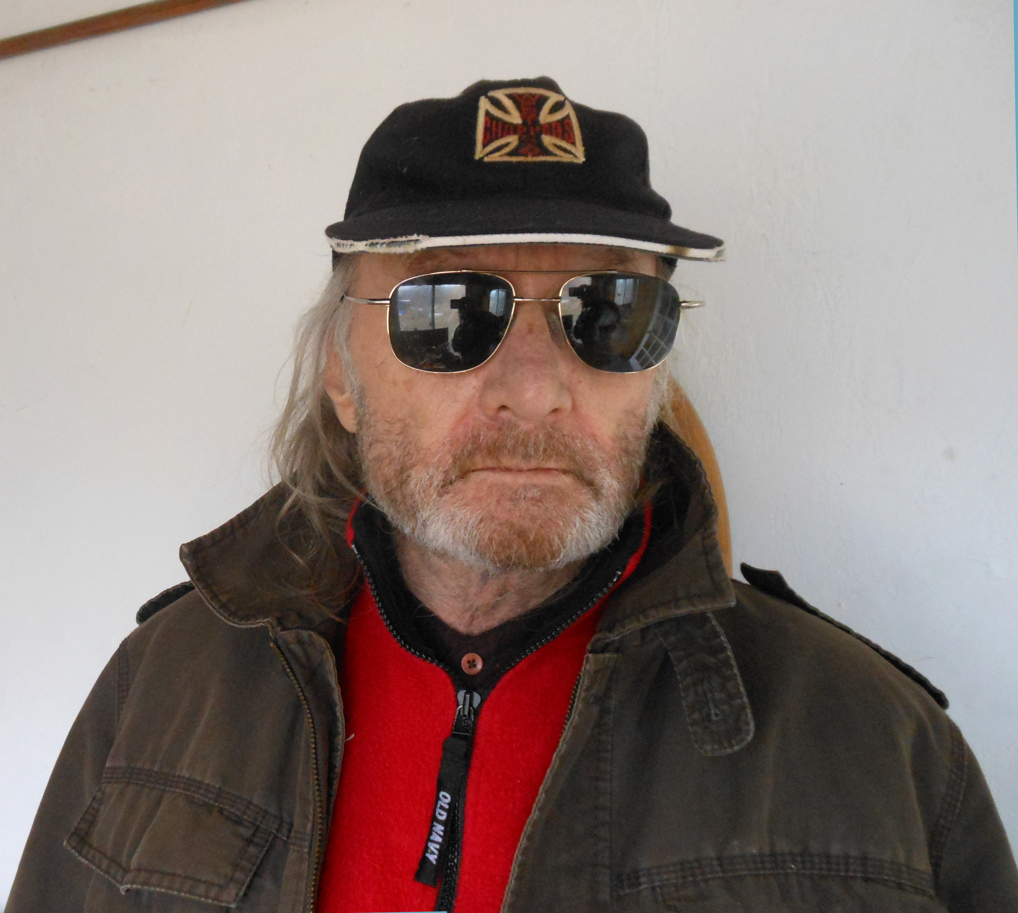 Paul Rotterdam